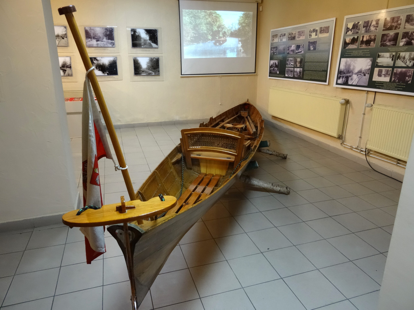 Muzeum Kanału Bydgoskiego w Bydgoszczy (przy budynku III L.O.)